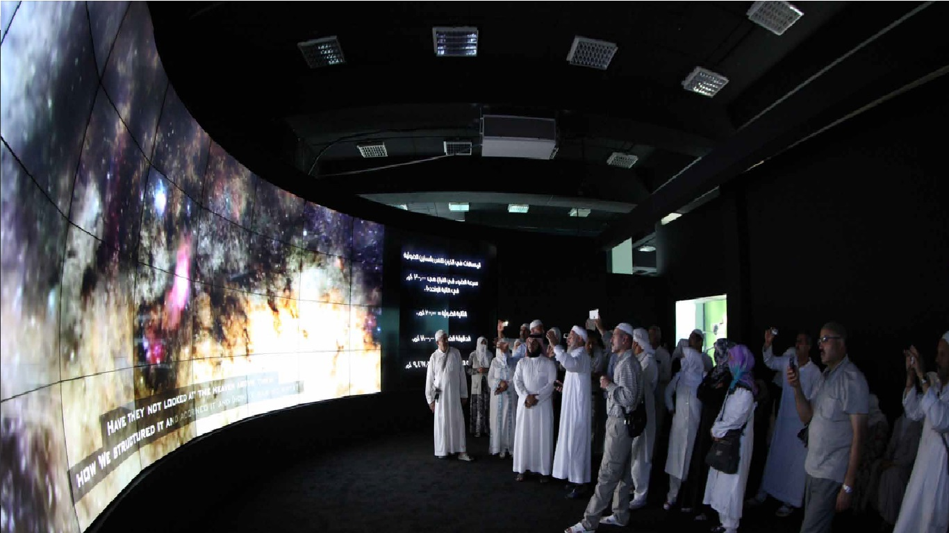 قاعة العرض البانورامي في معرض أسماء الله الحسنى بالمدينة المنورة